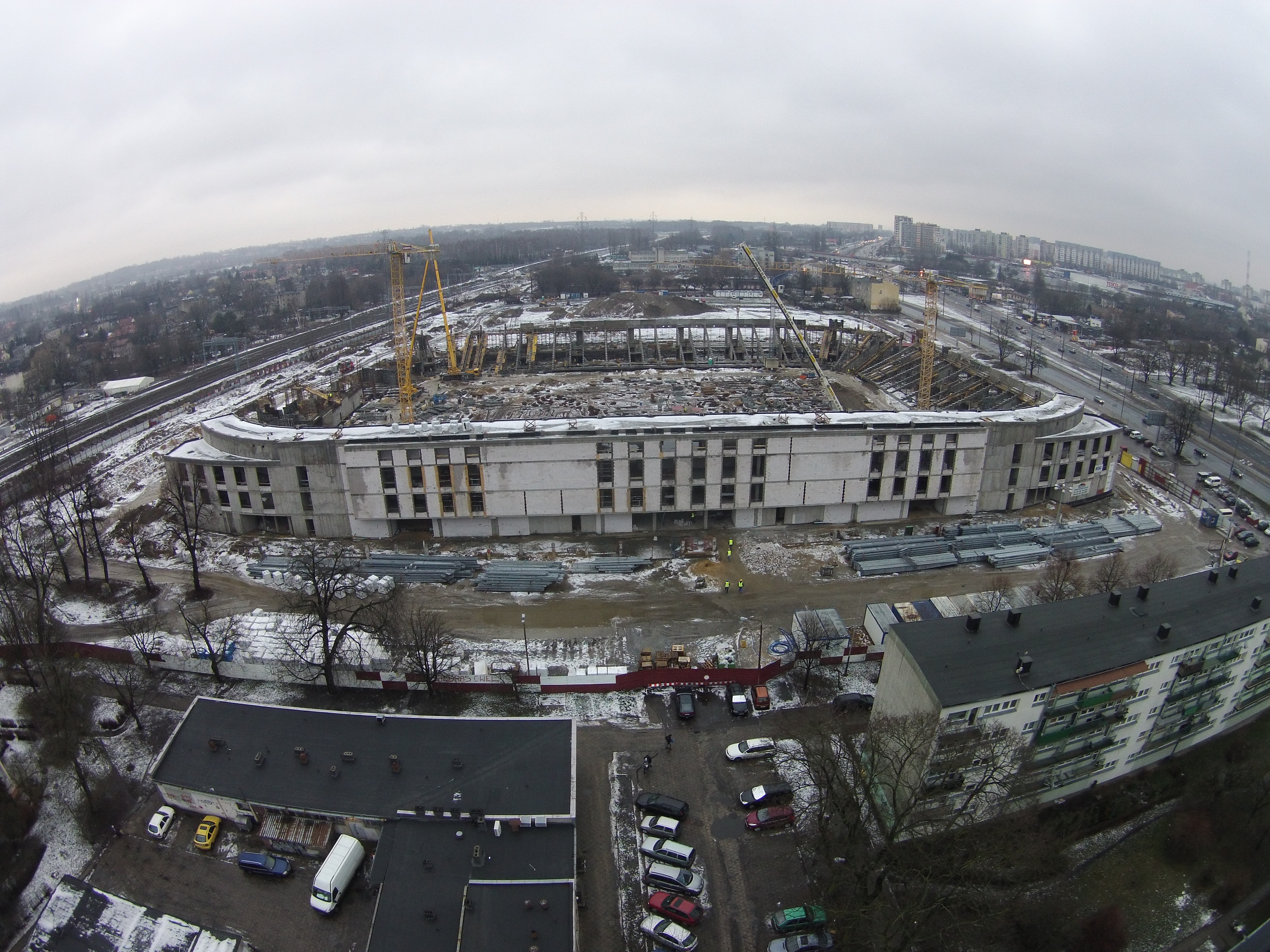 Stadion Widzewa w budowie. Widok z lotu ptaka.